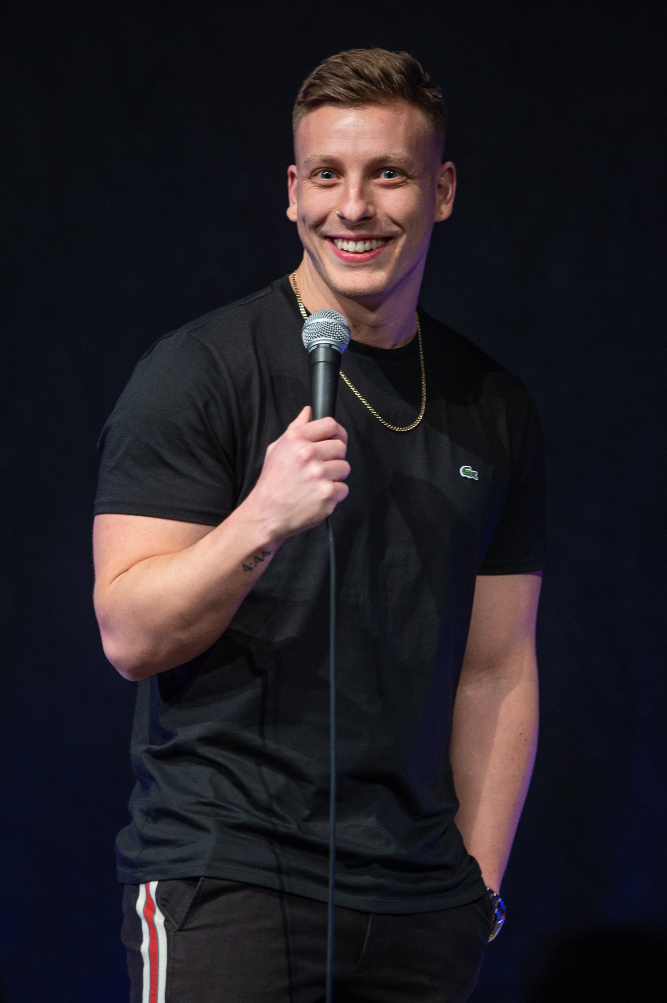 Comedy,Concertbüro Franken,Felix Lobrecht,LUX – Junge Kirche Nürnberg,Livecomedy